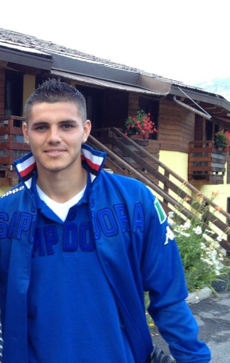 Mauro Icardi attaccante della Sampdoria